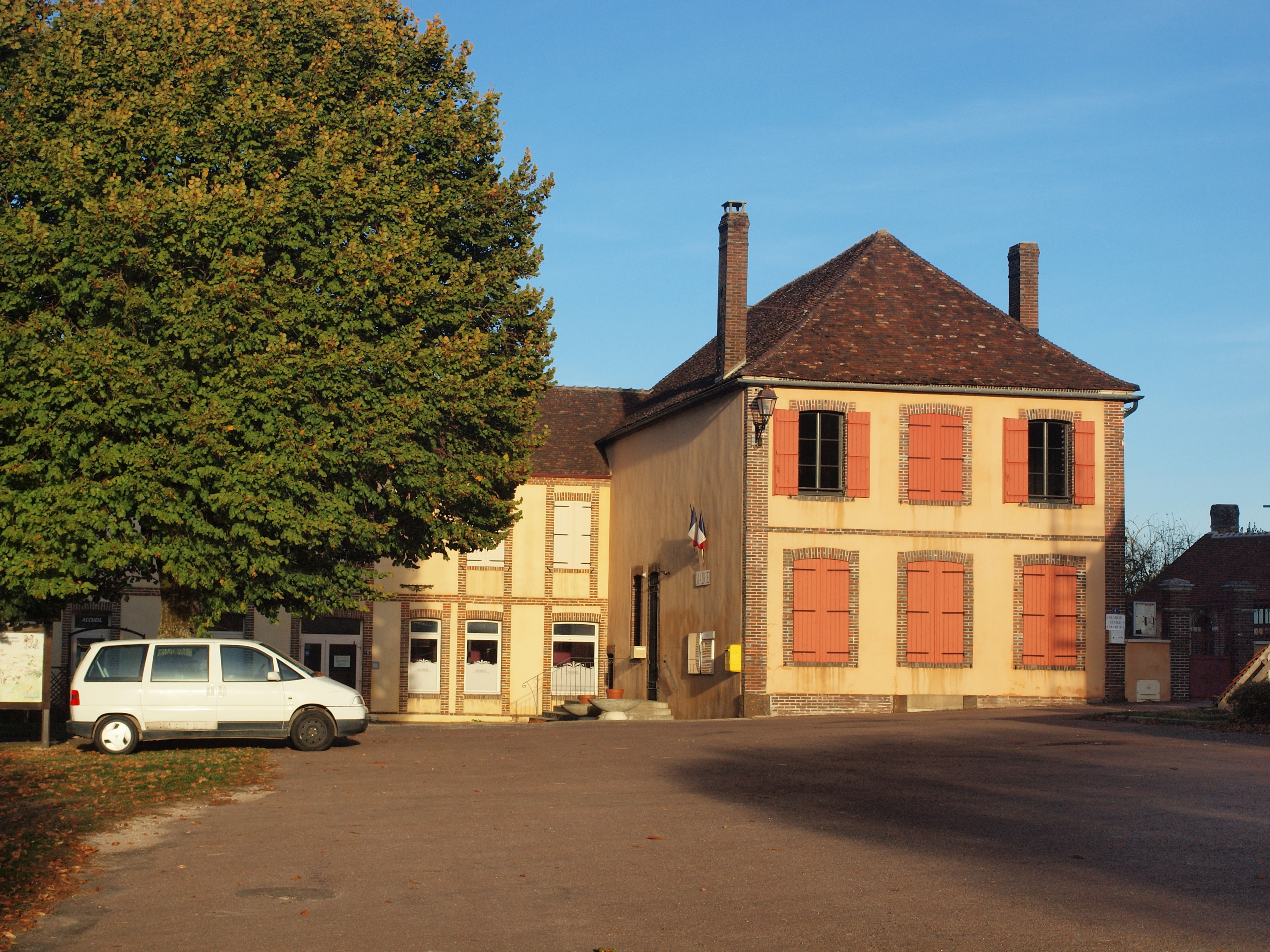 Mairie de Merry-la-Vallée (Yonne, France)